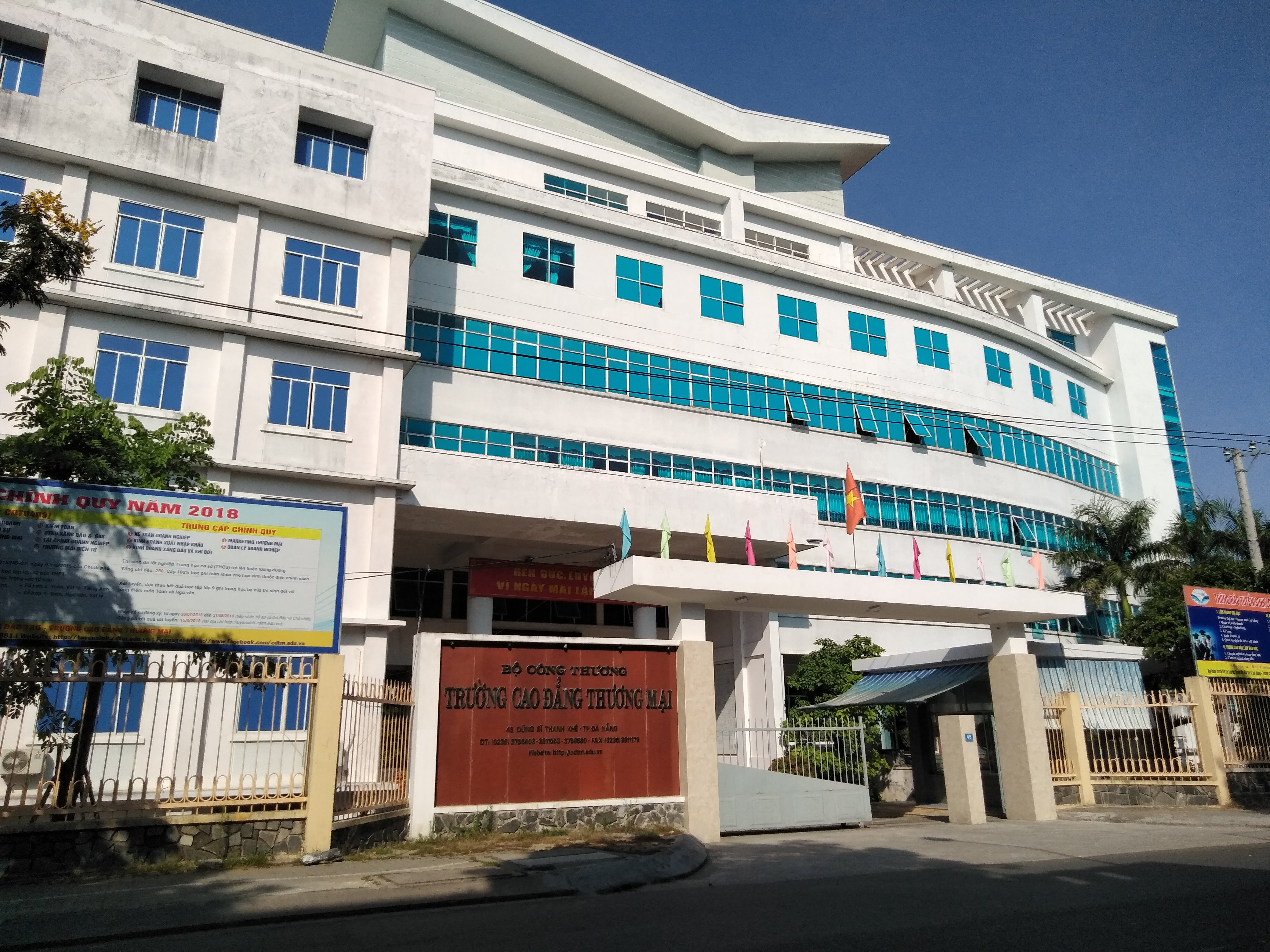 Trường Cao đẳng Thương mại Đà Nẵng